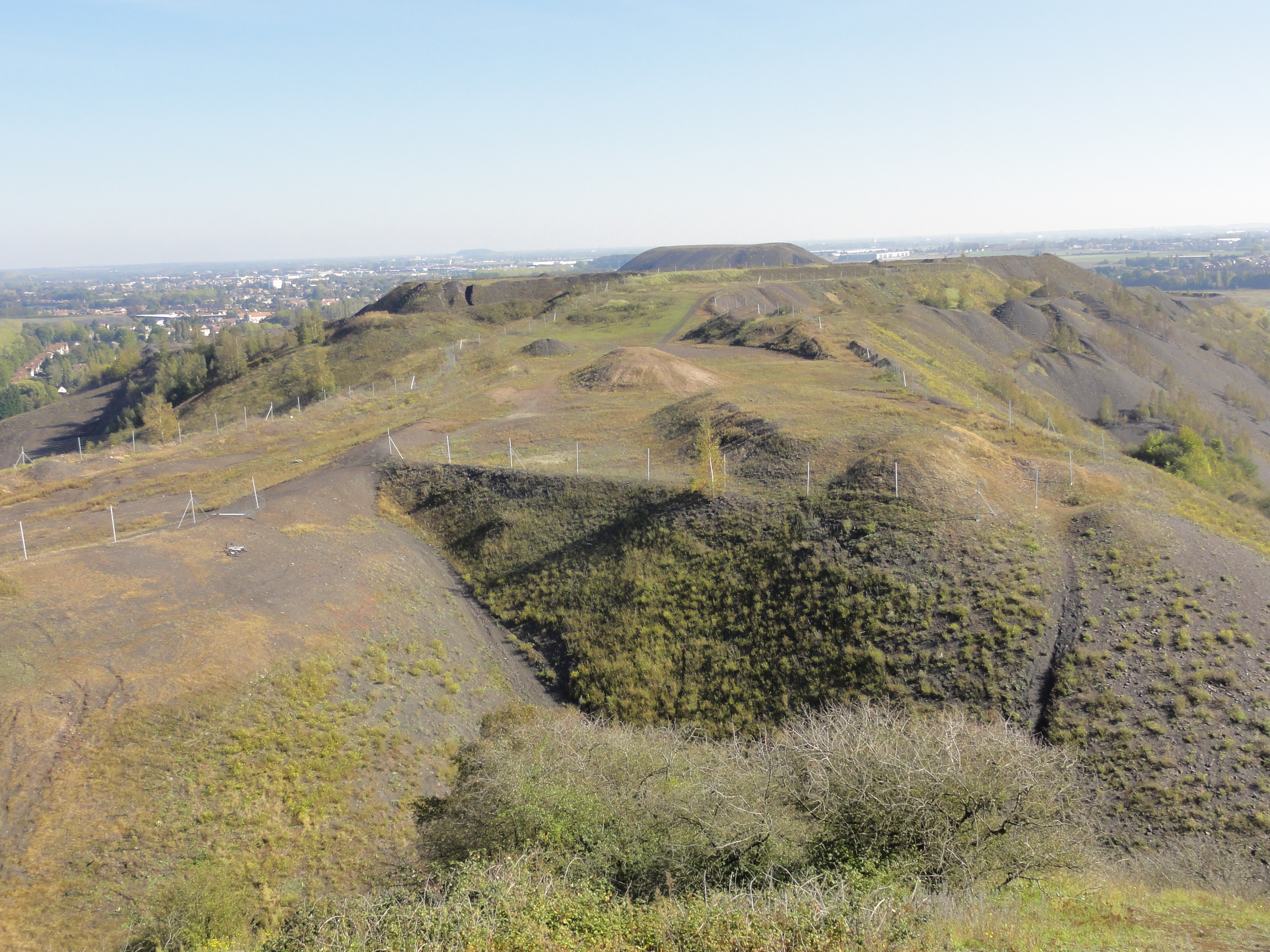 Terril n° 101 dit Lavoir de Drocourt, Lavoir de Drocourt du Groupe d'Hénin-Liétard dans le bassin minier du Nord-Pas-de-Calais, Hénin-Beaumont, Pas-de-Calais, Nord-Pas-de-Calais, France. Le terril no 101 est inscrit sur la liste du patrimoine mondial de l'Unesco le 30 juin 2012 et y constitue en partie le site no 48.